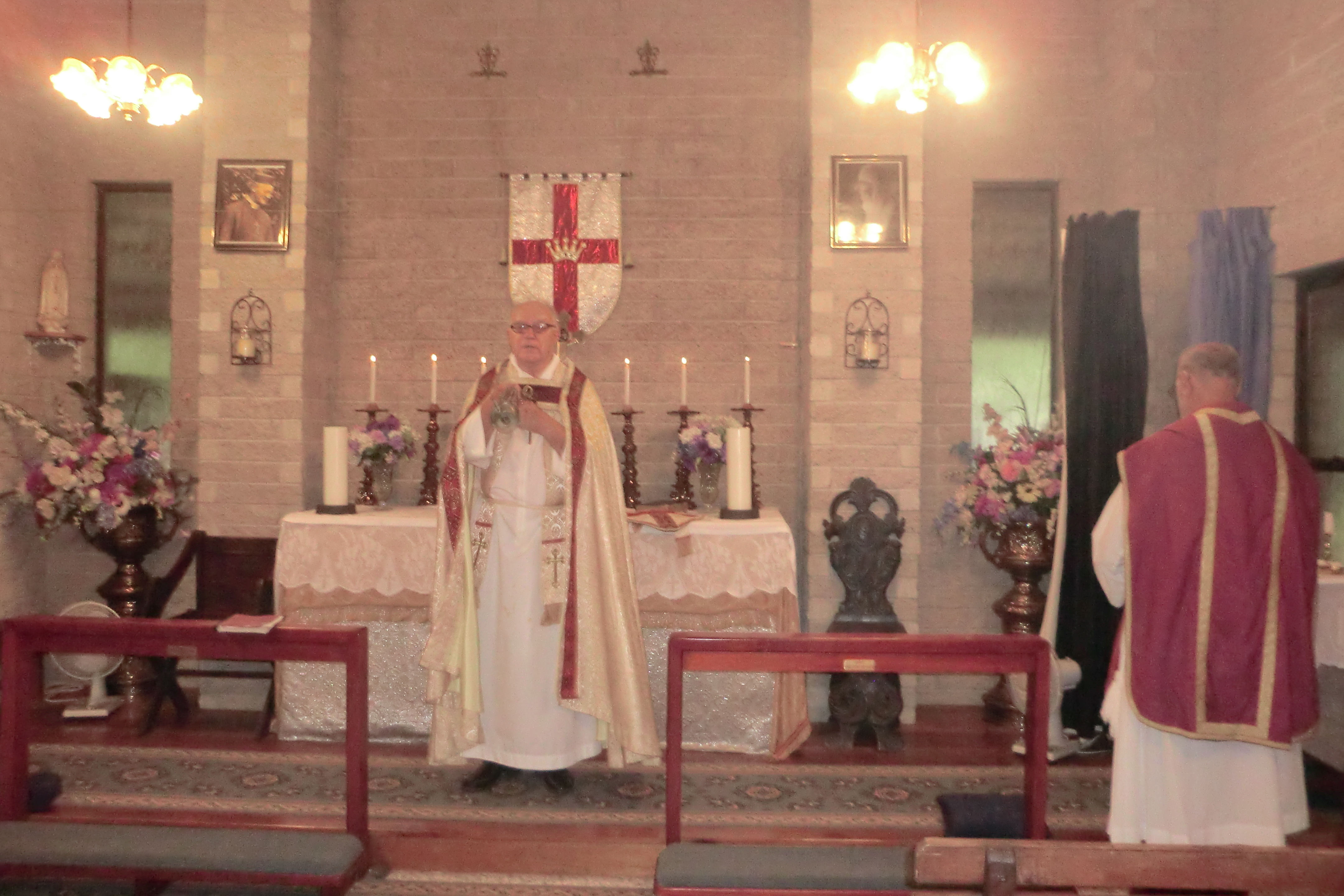 Keuskupan Orthodox Catholic Church of The New Age di Calboolture, Australia